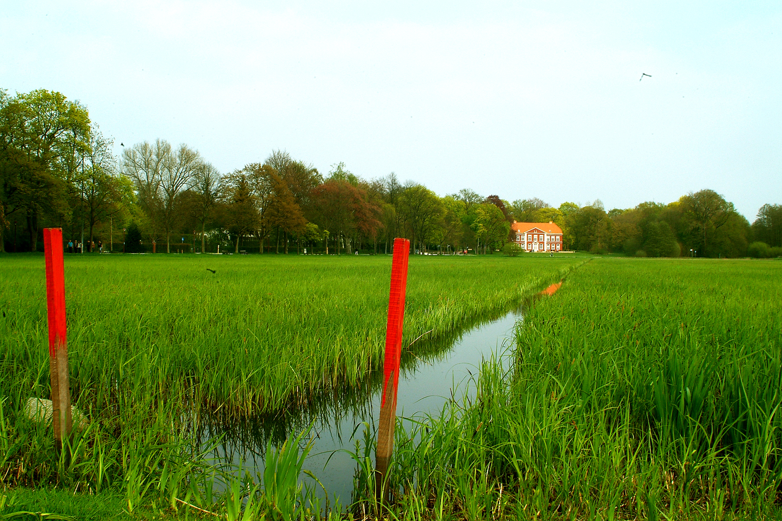 Sie haben ein besseres Bild? Sogar ein historisches Dokument als Bild(ungsförderung)? Zeigen Sie' s uns. Stiften Sie es, allen Menschen.